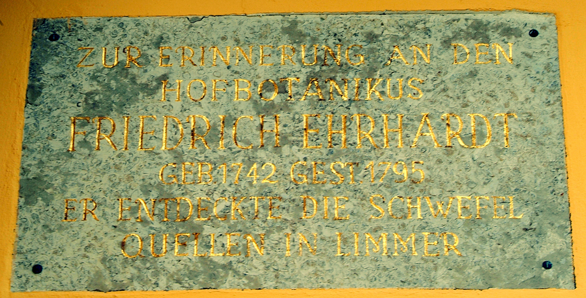 Gedenktafel am Bibliothekspavillon vor dem Berggarten in Hannover "Zur Erinnerung an den Hofbotanikus Friedrich Ehrhardt / Geb 1742 Gest 1795 / Er entdeckte die Schwefel Quellen in Limmer"